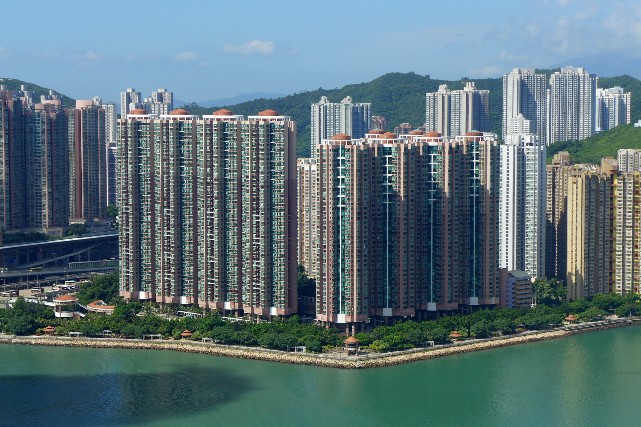 Villa Esplanada, Tsing Yi